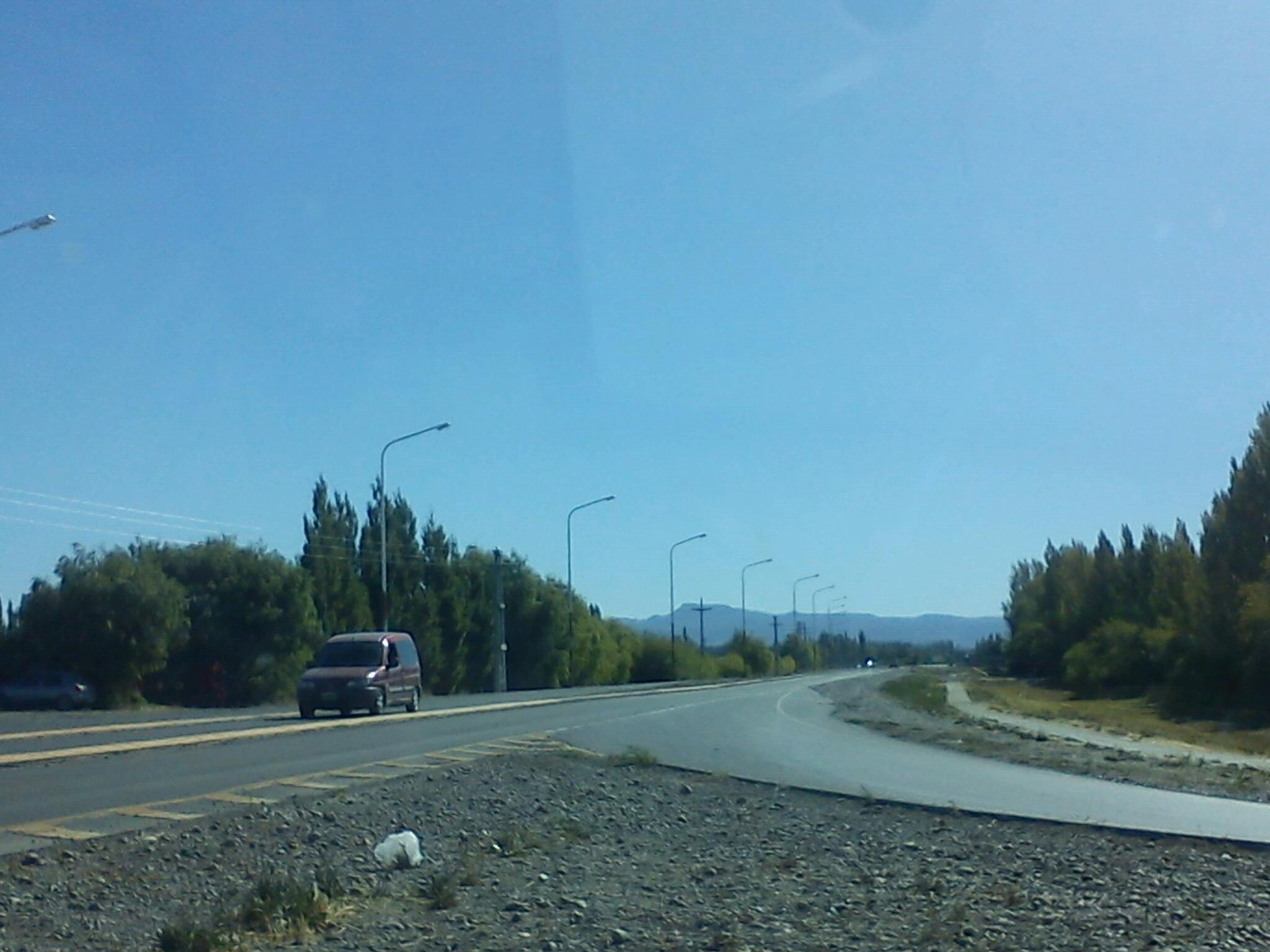 Vistas de Sarmiento